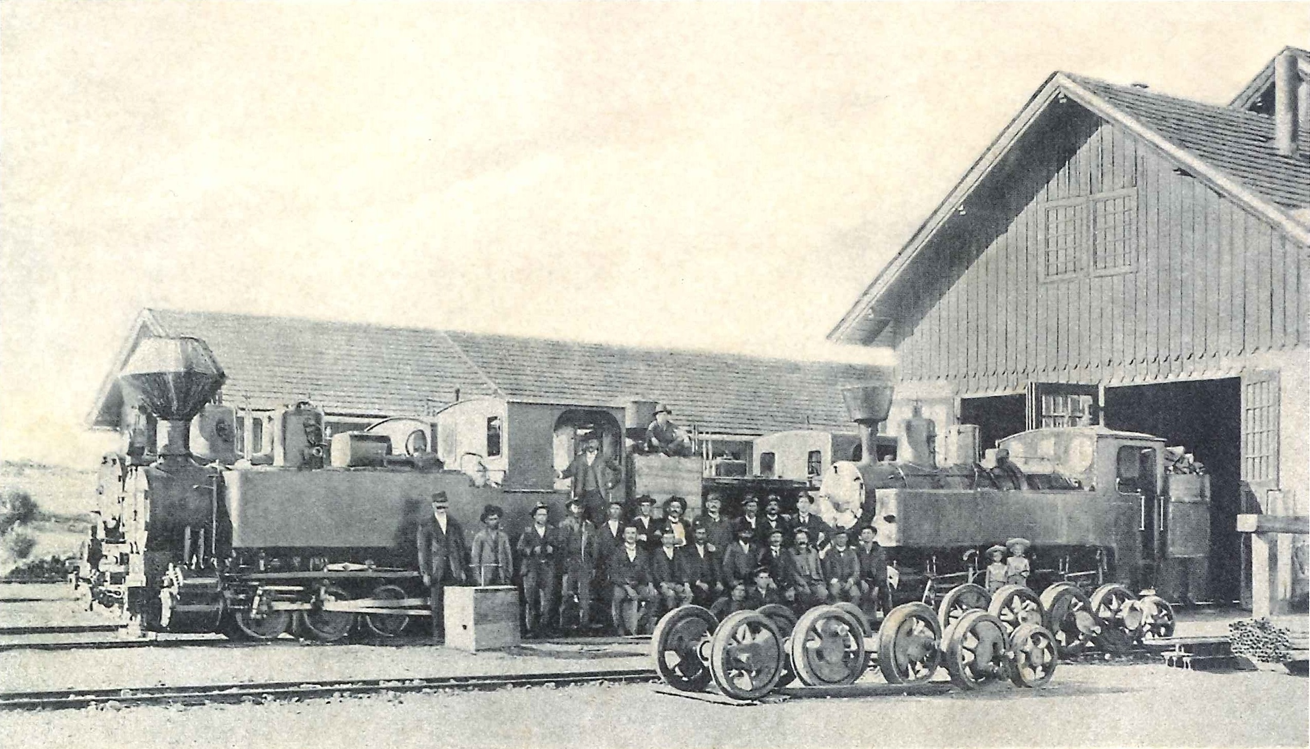 Heizhaus Drvar der Steinbeisbahn: Erinnerungsbild mit Personal, E-Dampflokomotive aus dem 1911 und B+B-Mallet-Lokomotive aus dem Jahr 1904